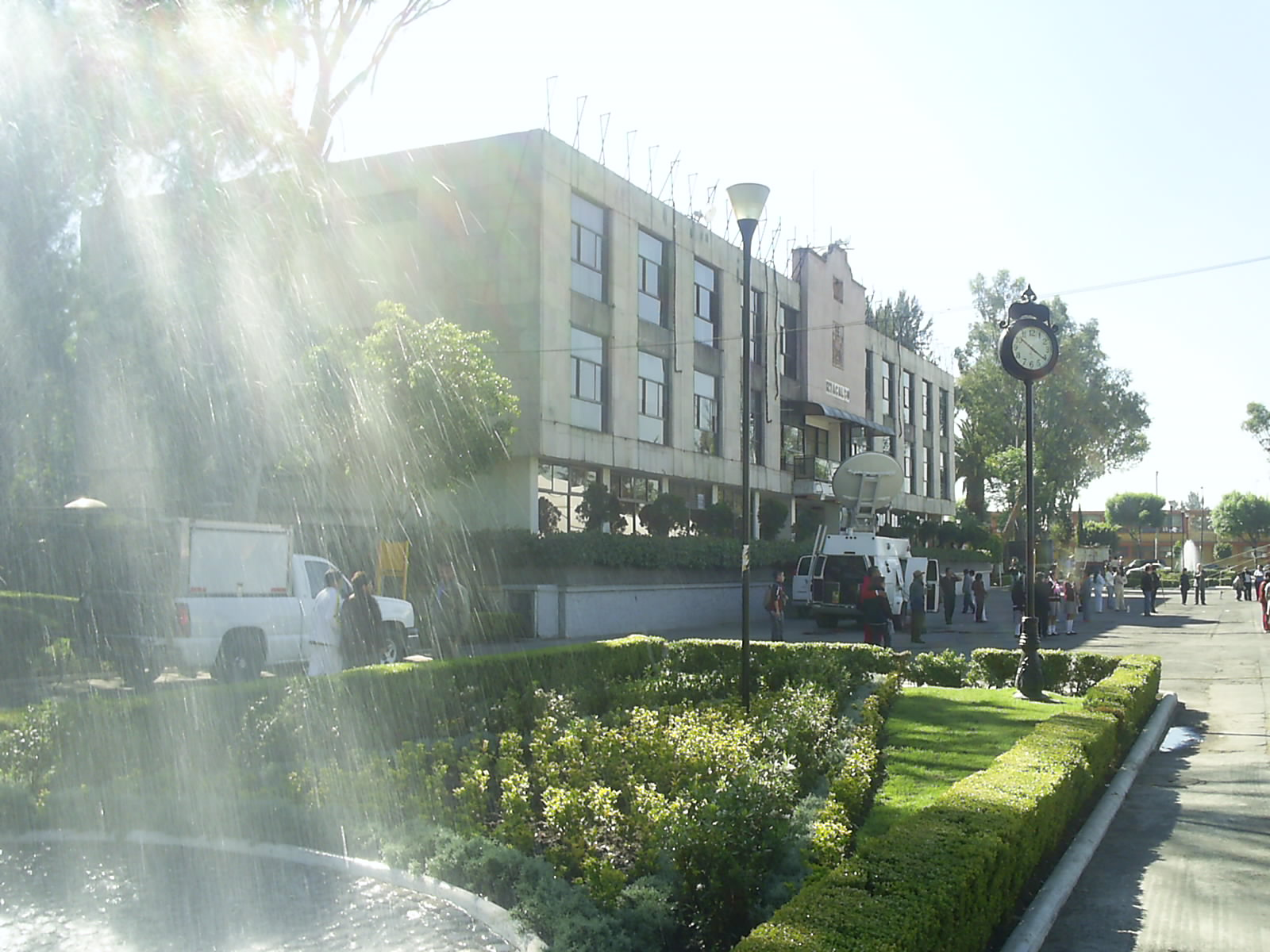 Iztacalco Delegación en México DF